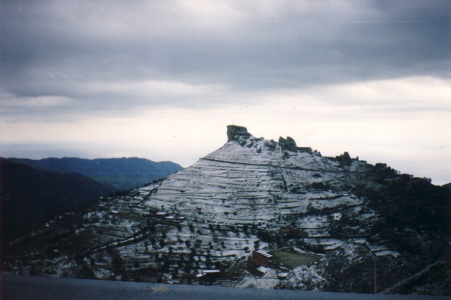 Inverno a Bova Superiore. 2000-2001?